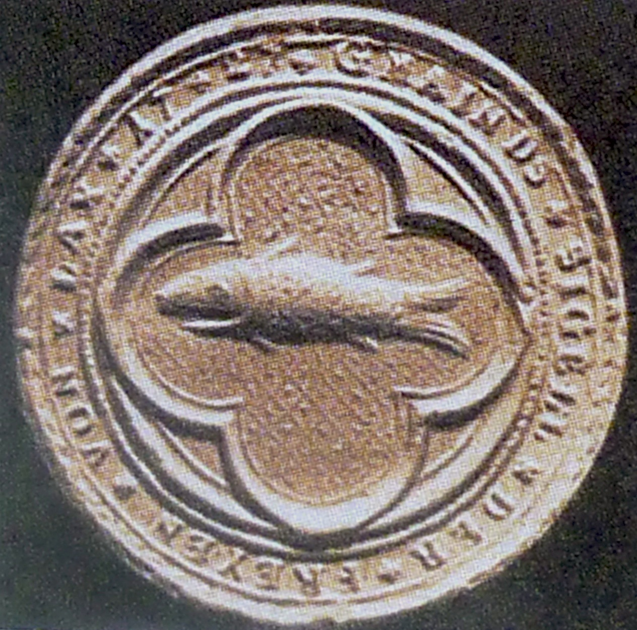 Freie von Laax «Gmainds Siegel der Freyen von Lax 1727»